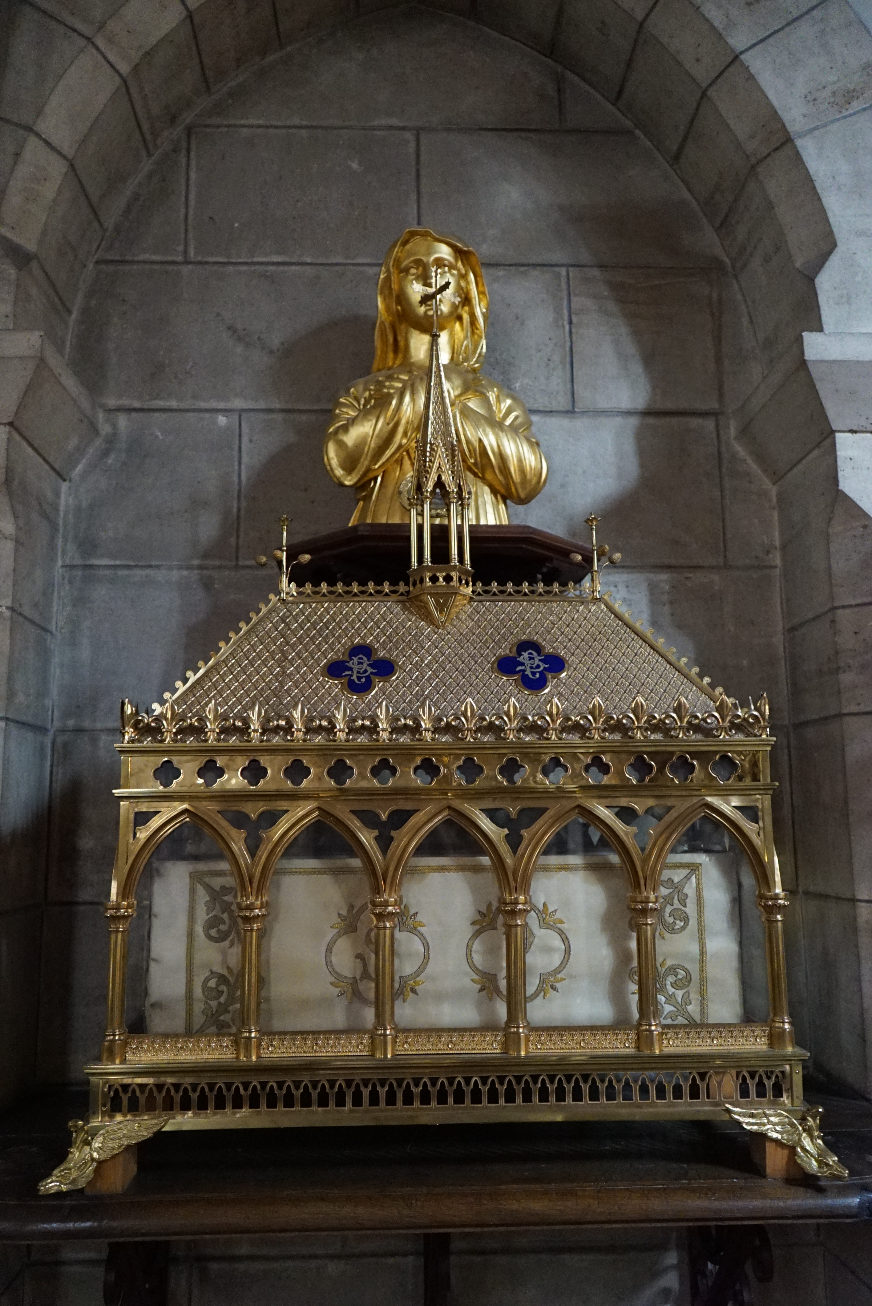 reliquaire Pome en l'Église Saint-Memmie de Saint-Memmie.